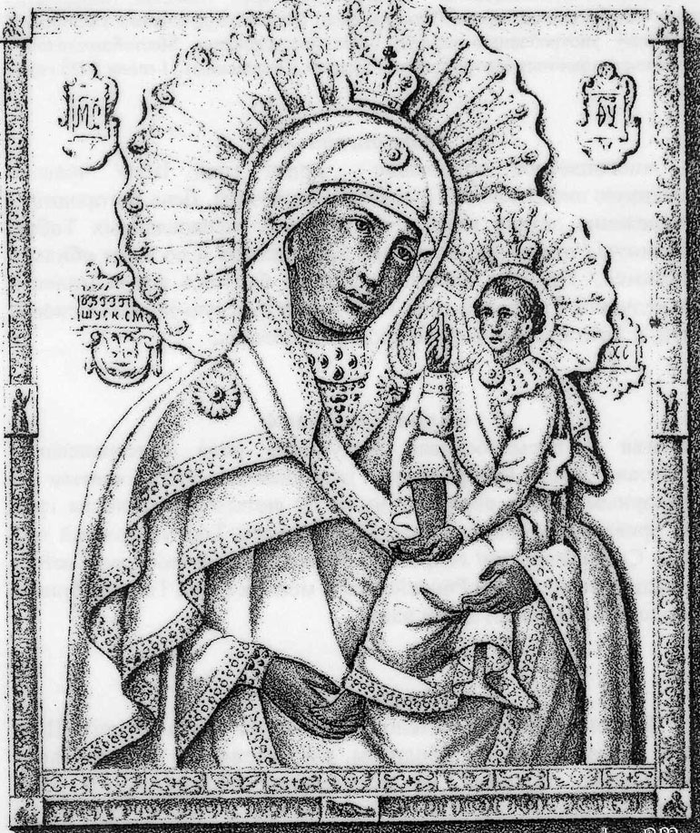 Литография 1862 года Шуйско-Смоленской иконы Божией Матери 1655 года из Воскресенского собора Шуи.